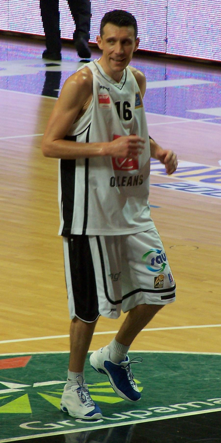 Laurent Sciarra sous le maillot de l'Entente Orléanaise Loiret, le 23 mai 2009.